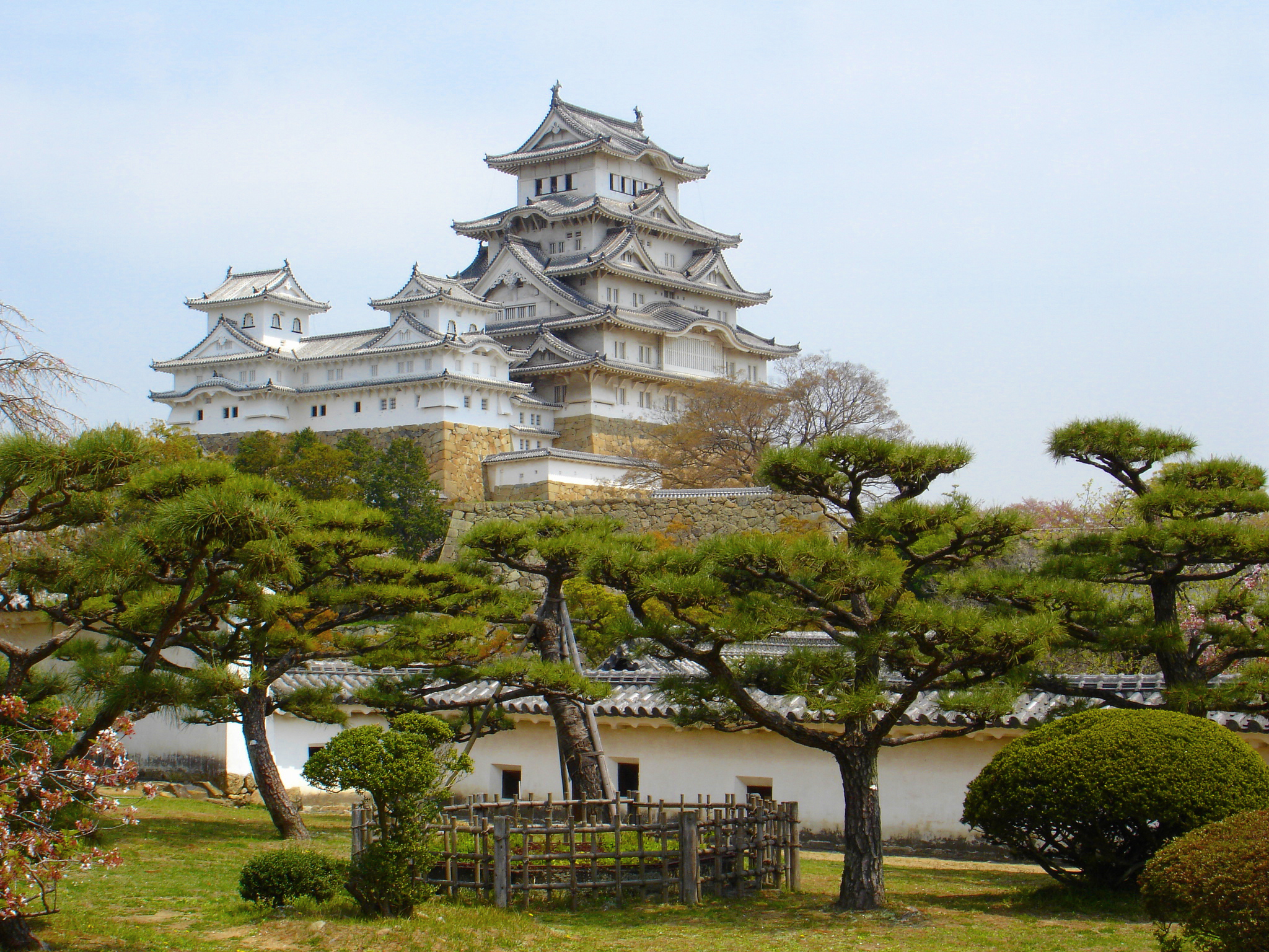 Chateau de Himeji Photo personnelle